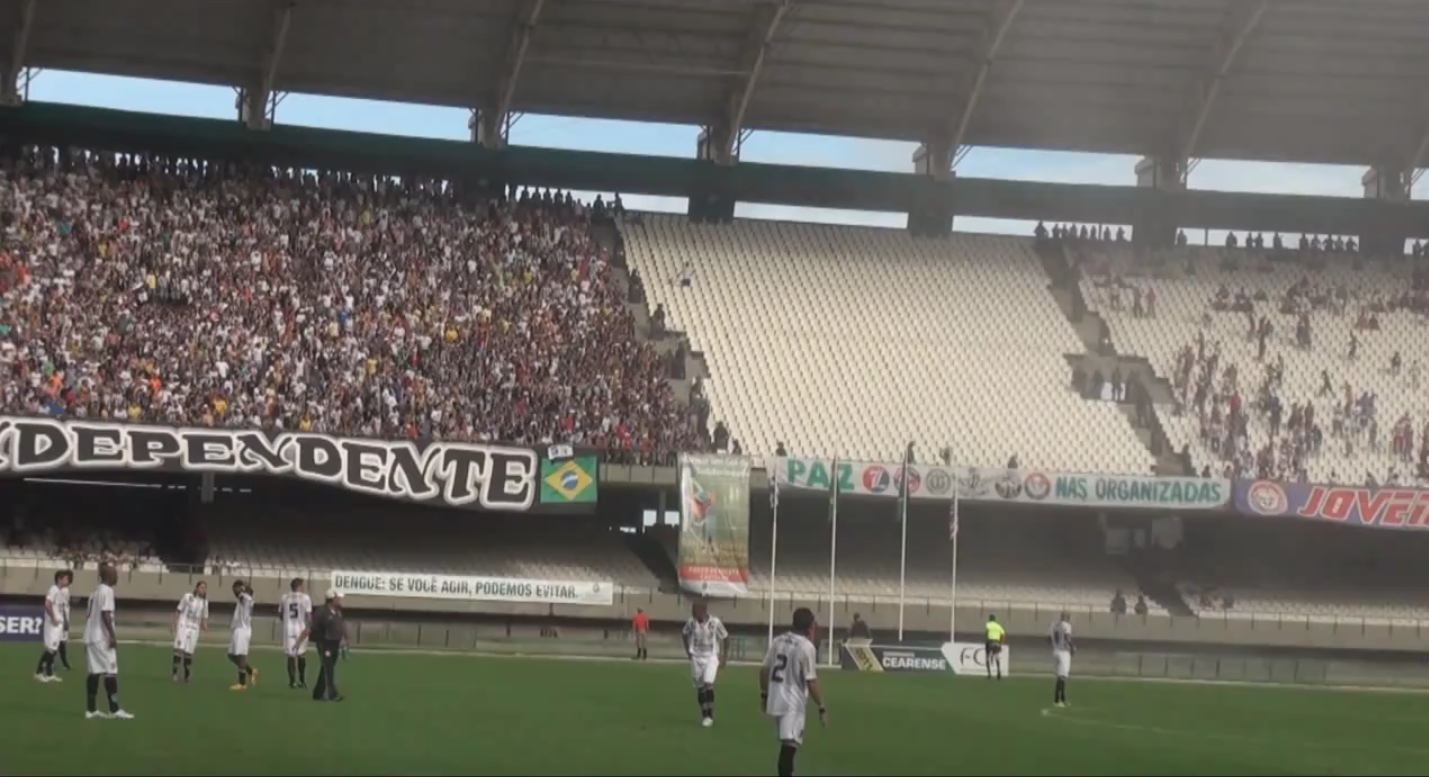 Clássico-Rei com maioria alvinegra. 30/1/2011 - Ceará 2x1 Fortaleza